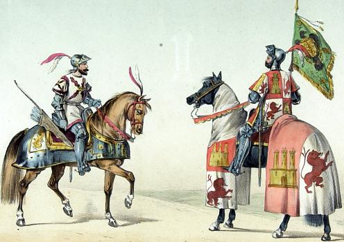 Ilustración del Conde de Clonard de la Guardia Vieja de Castilla